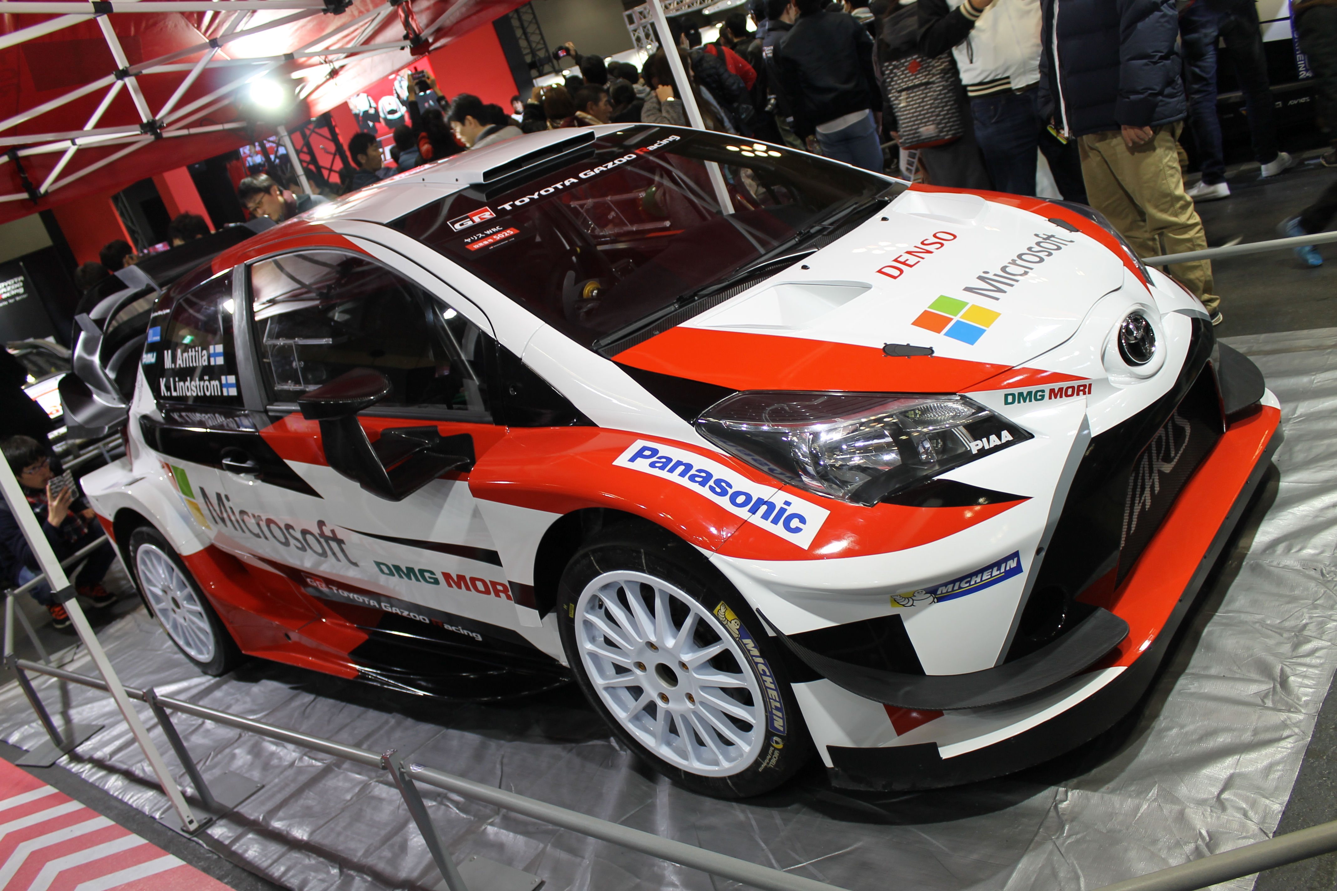 大阪オートメッセにて